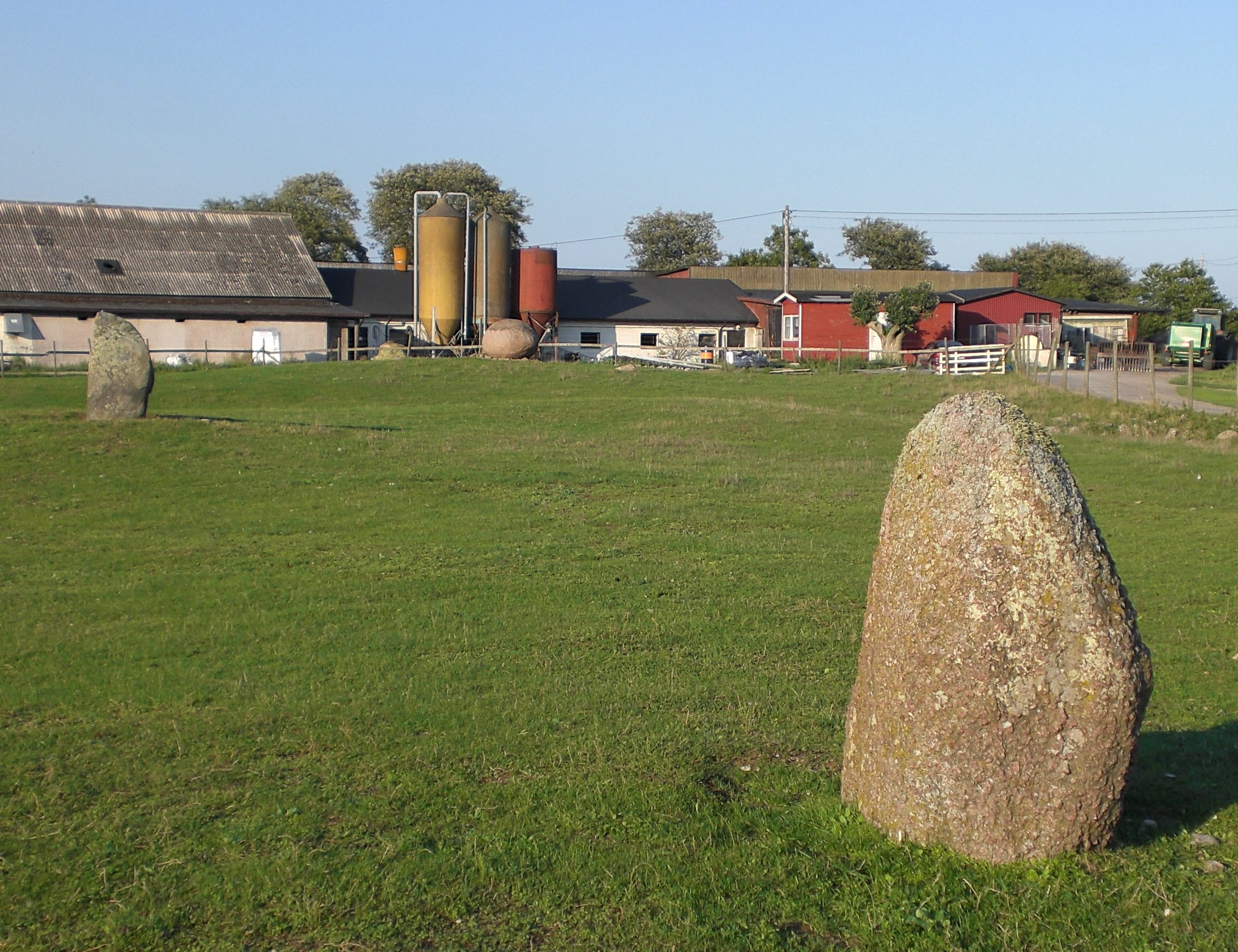 Gräberfeld bei Folkeslunda, Öland, Schweden mit Folkeslundastein (mitte)